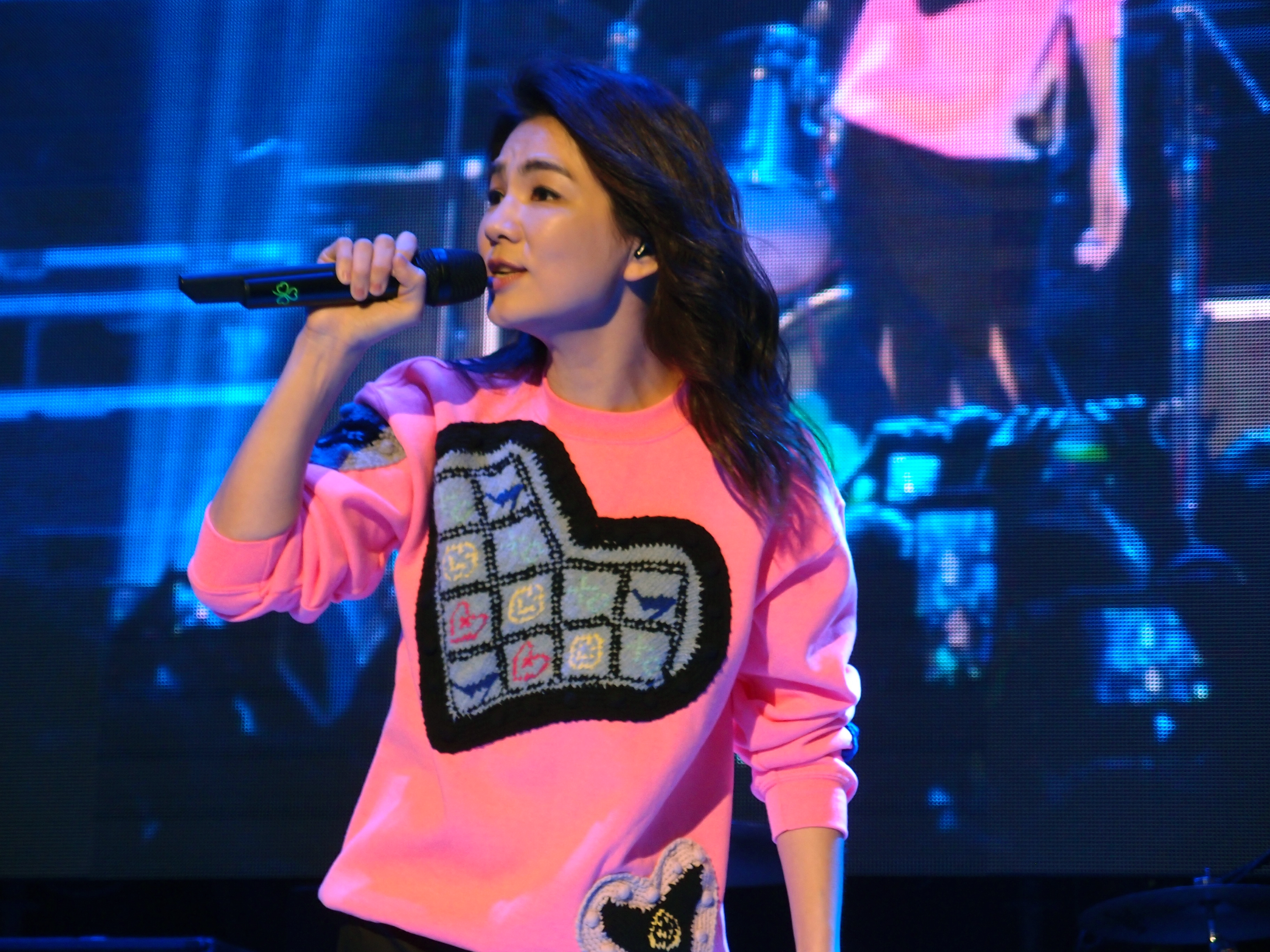 Ella陳嘉樺